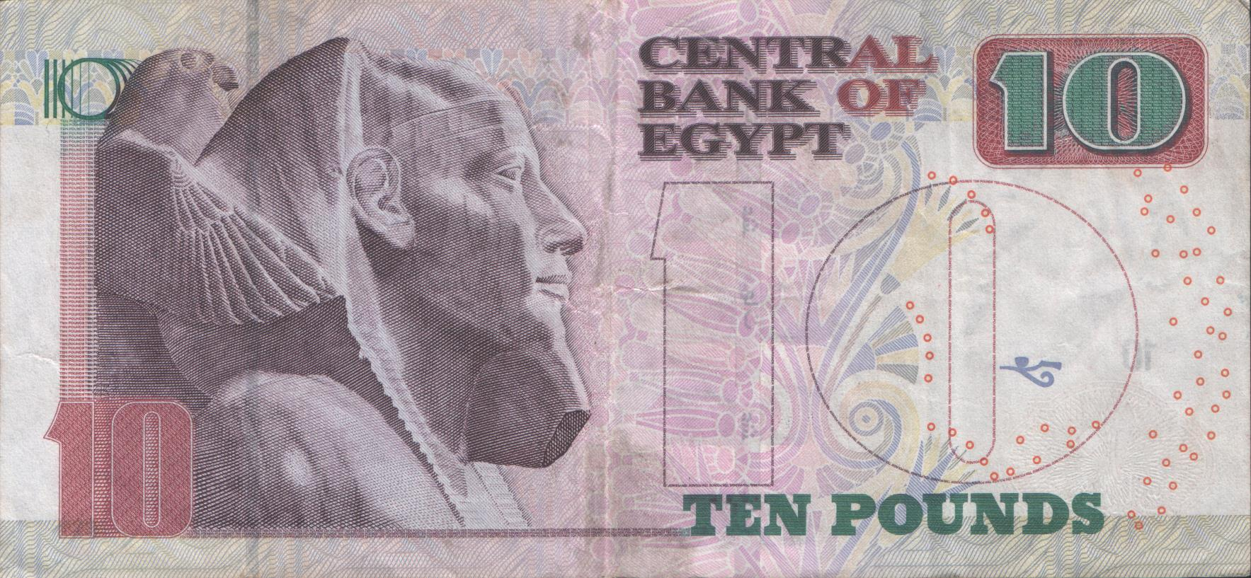 10 EGP reverse 2014-8-13